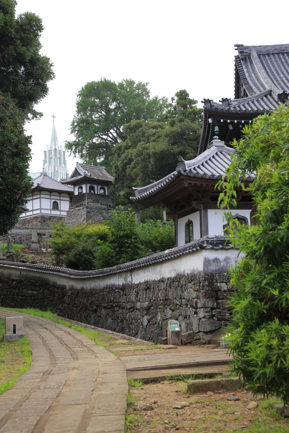 寺院と教会の見える風景（平戸市鏡川町、2014年（平成26年）7月）